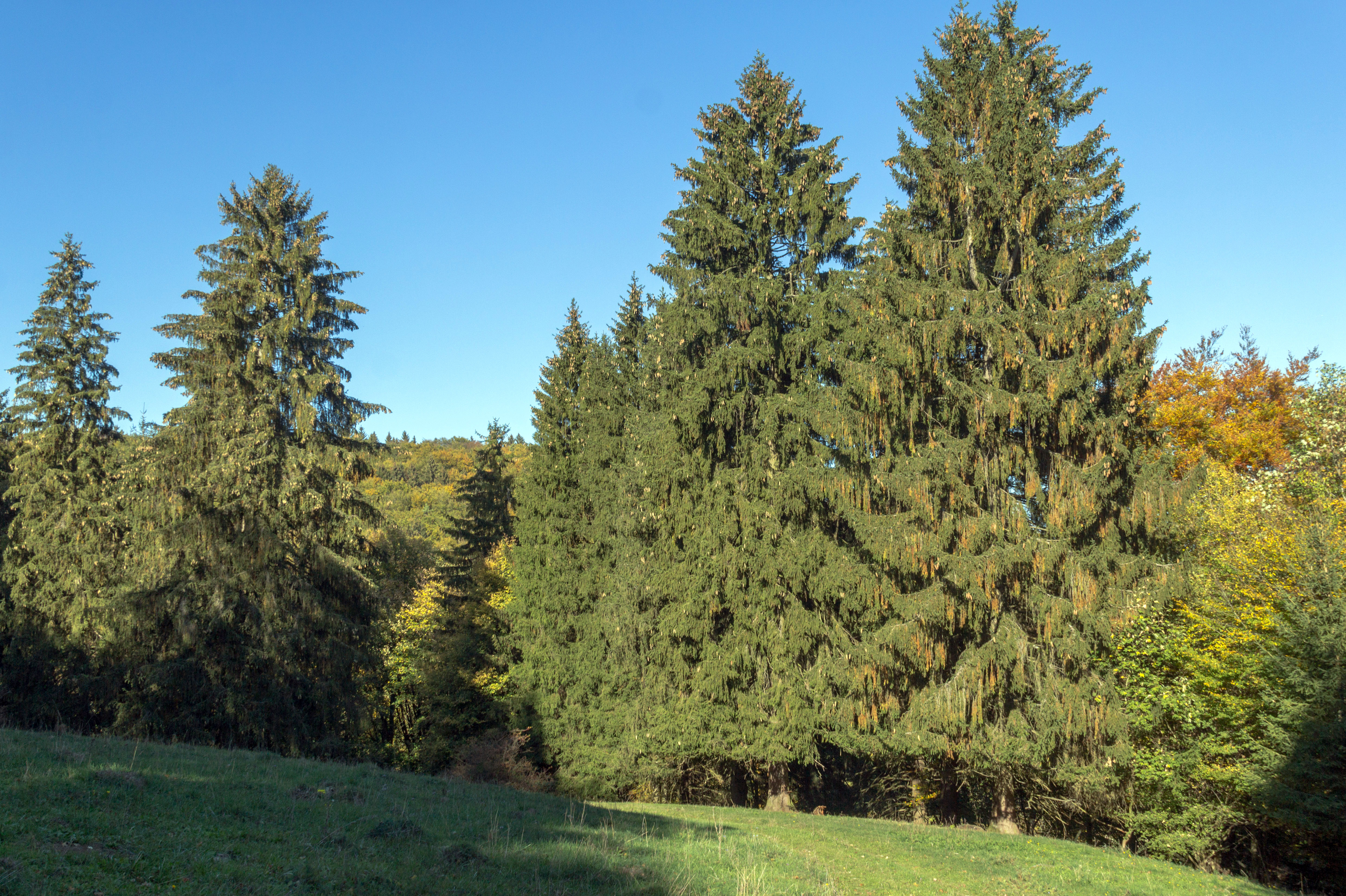 Hinterhaslacher Hutanger, geschützter Landschaftsbestandteil, FFH Bachtäler der Hersbrucker Alb